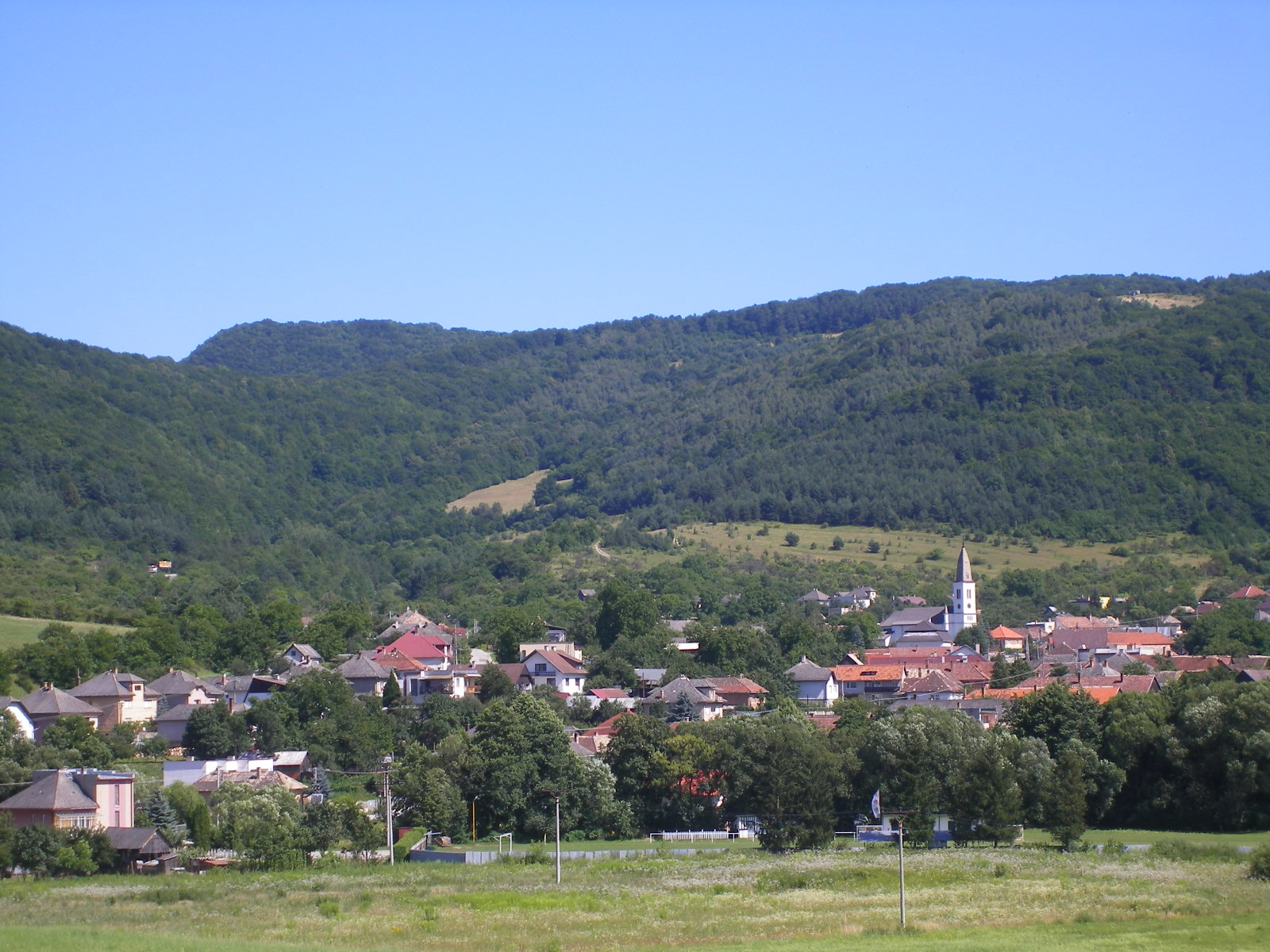 Hárskút - a falu látképe délnyugat felől